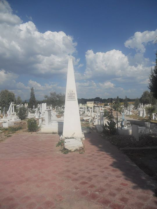 Sepulgro del gral. Pedro Meoqui y su piramide egipcia